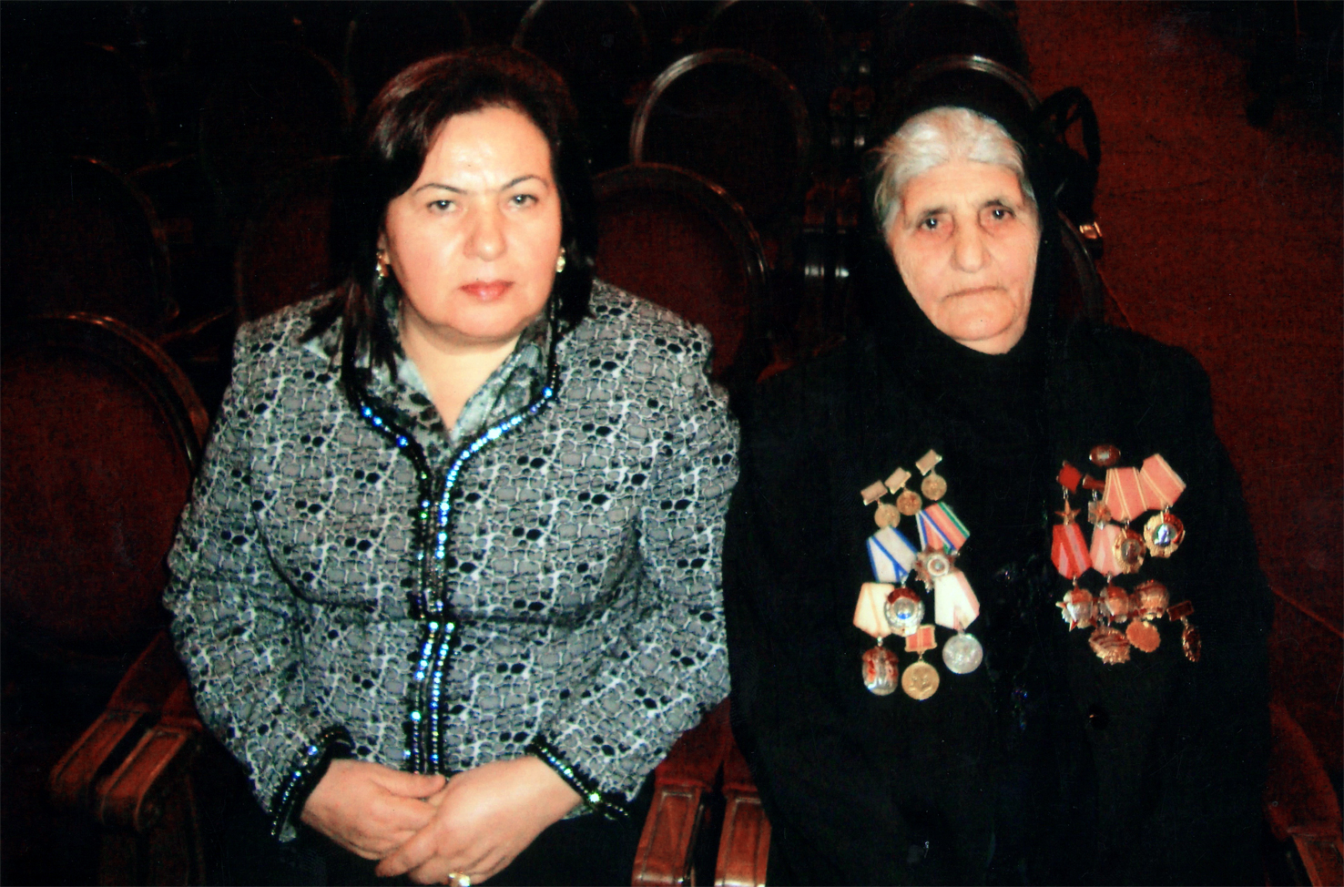 Sosialist Əməyi Qəhrəmanları — Tərlan Musayeva və Şərqiyyə Vəliyeva